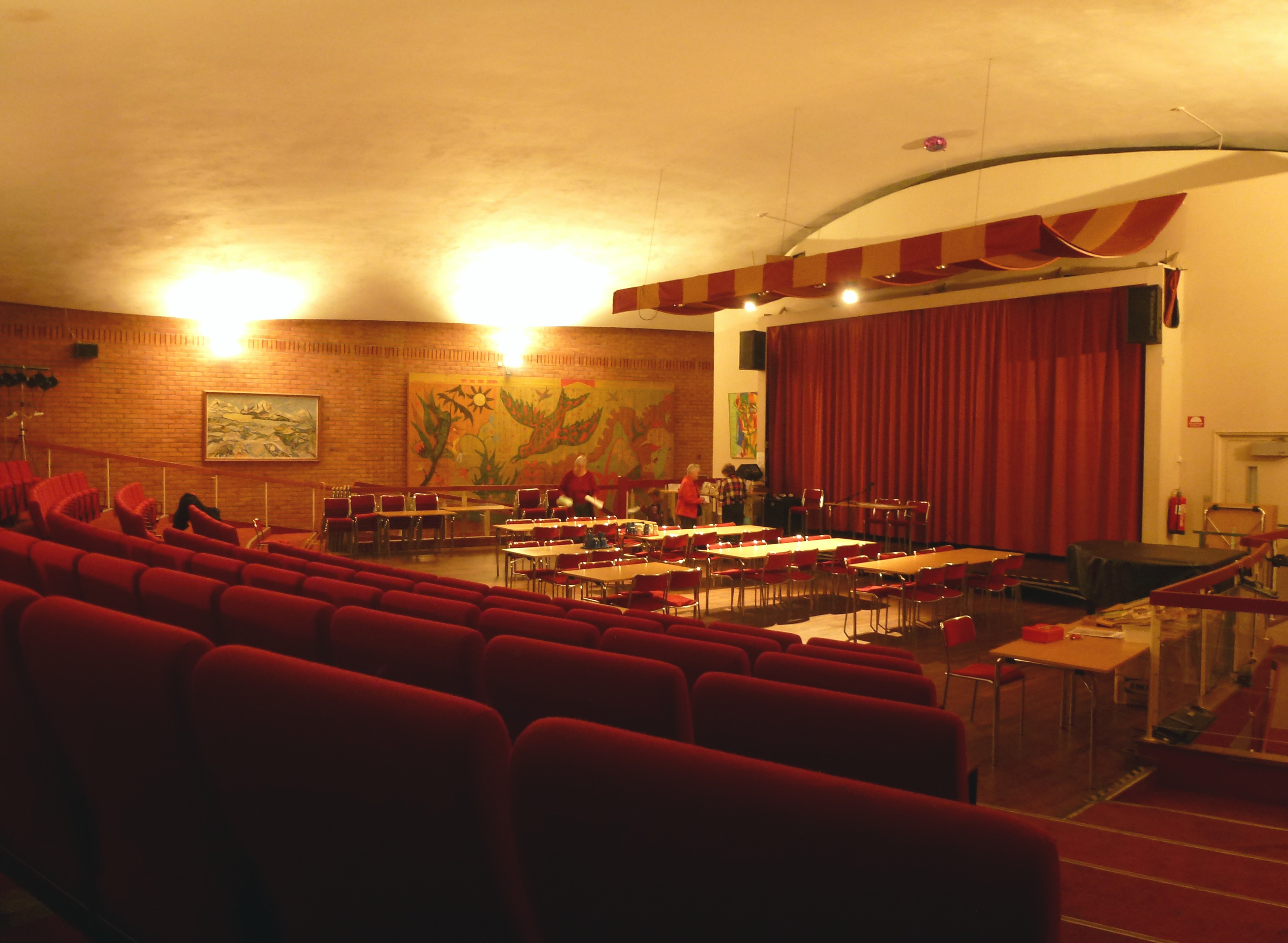 Årsta centrum forum, salen